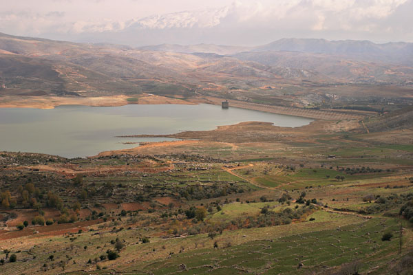 Lake Qaraaoun (Lebanon)